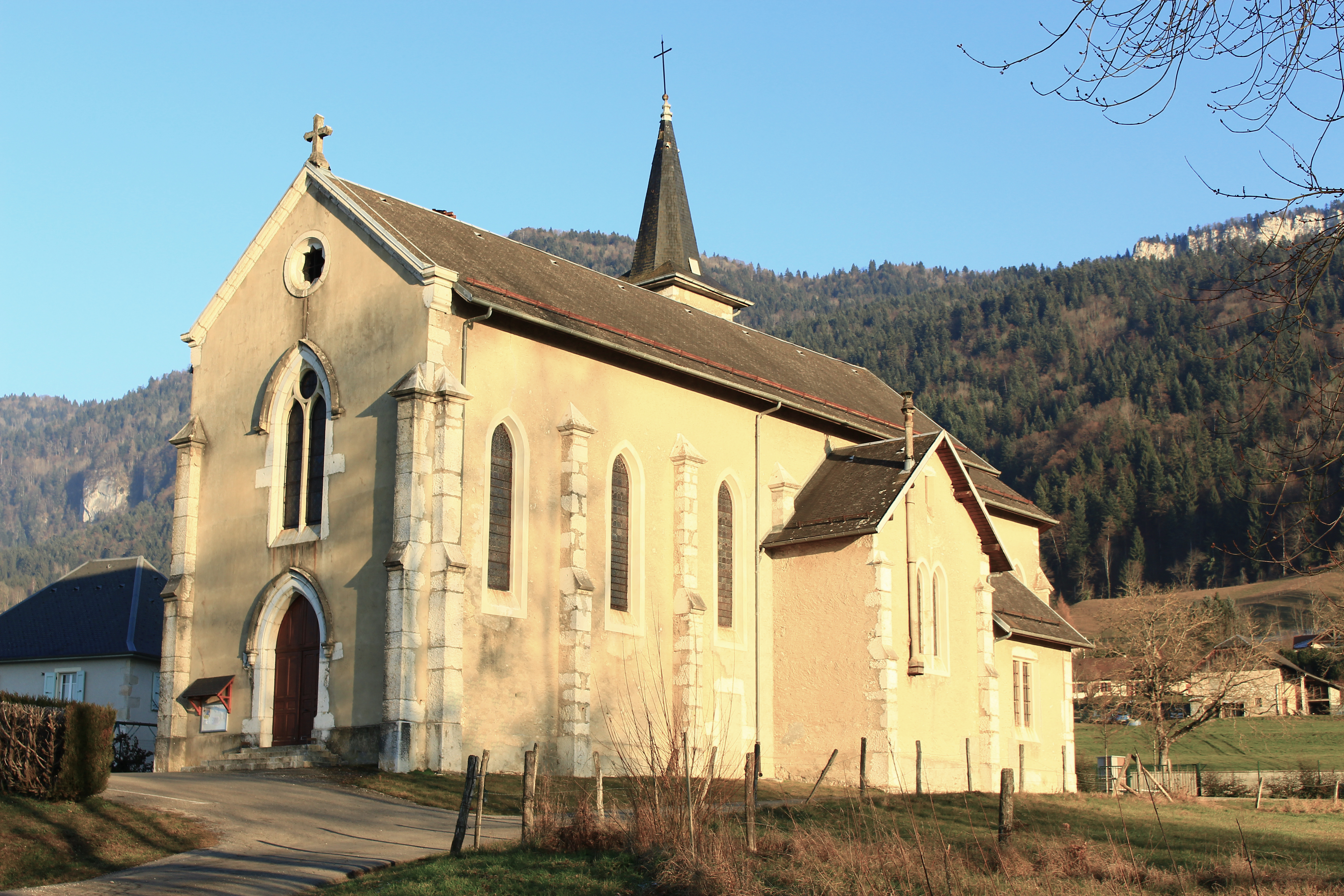 L'Eglise de La Bauche La Bauche, Savoie (France) Décembre 2016